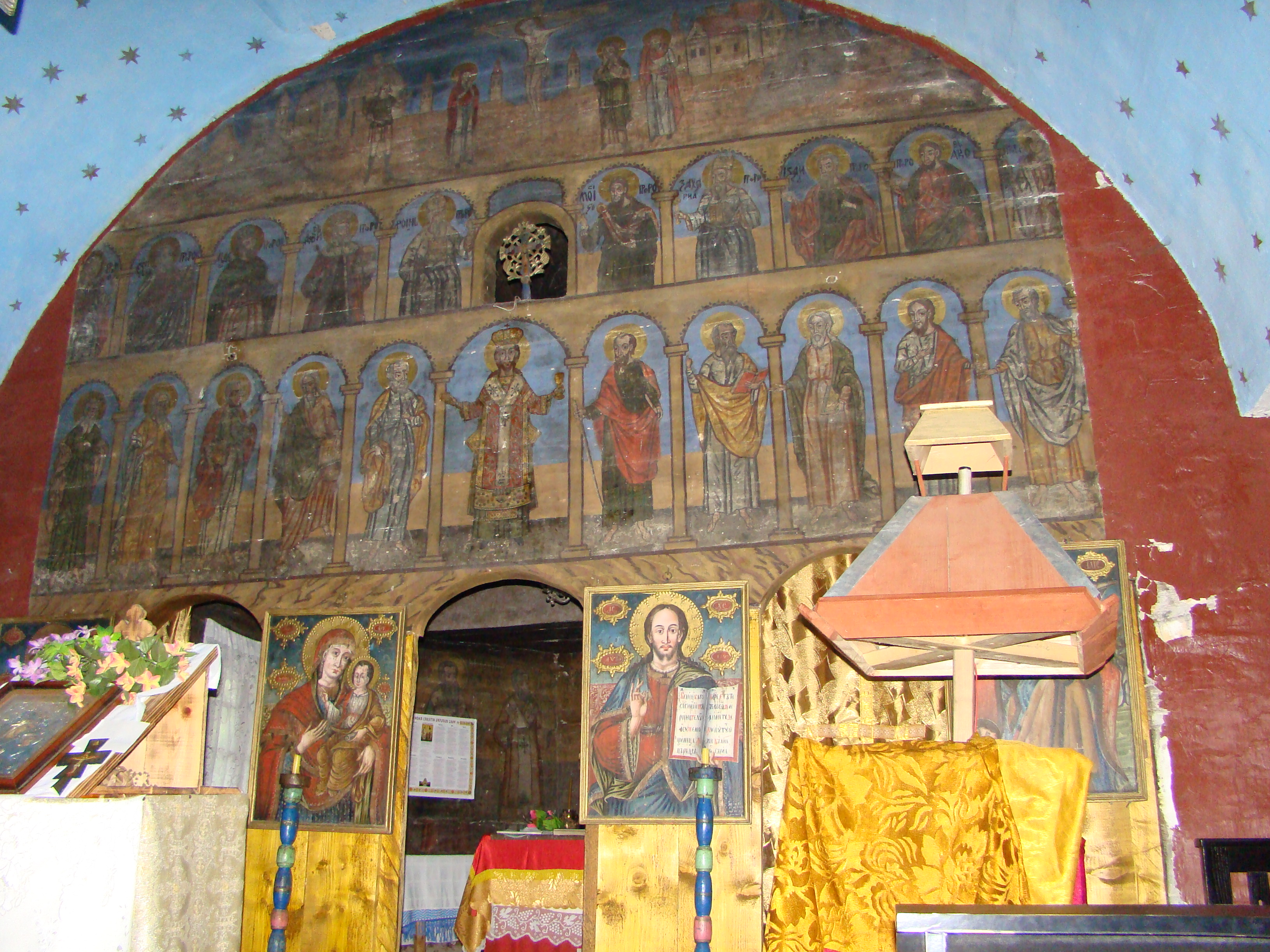 Biserica de lemn din Întregalde